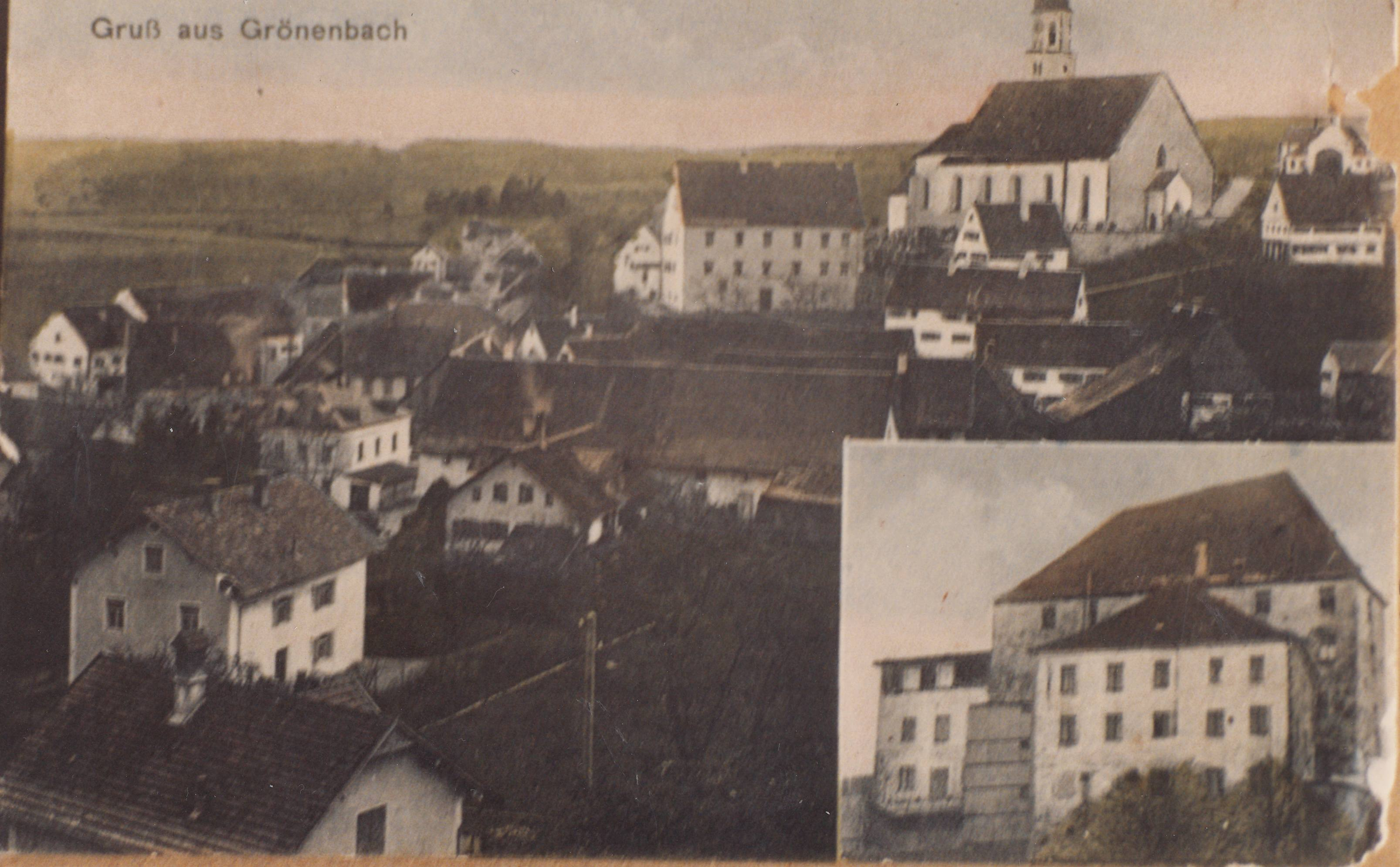 Bad Grönenbach, Landkreis Unterallgäu, Bayern